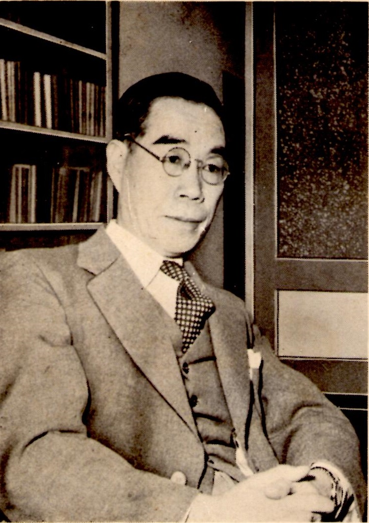 1955年刊行の『フランス文学の精神』(河出文庫)より。